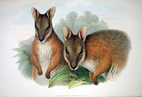 Macropus eugenii (orig. Halmaturus derbianus)